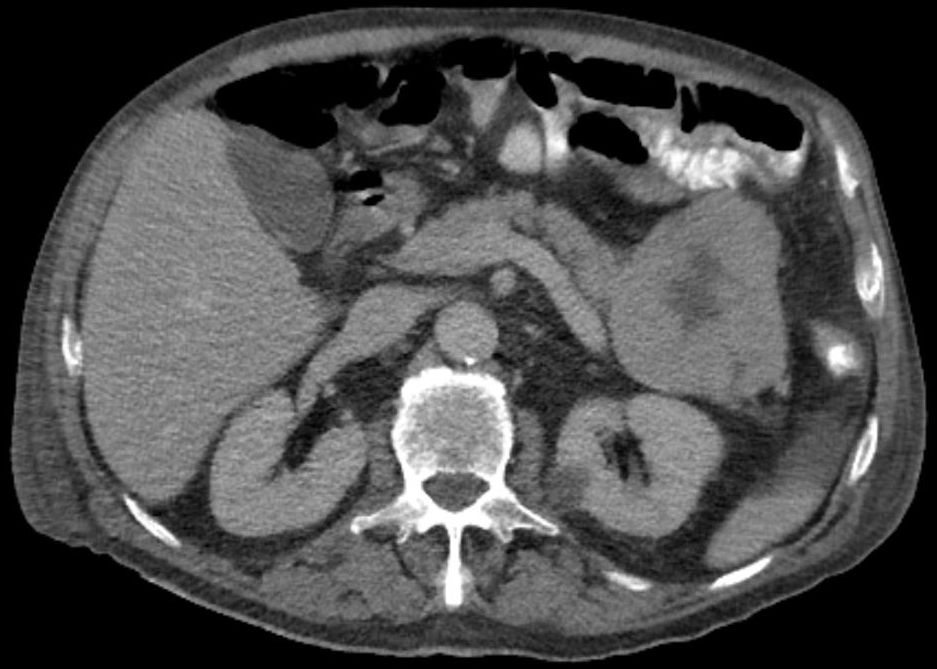 Azinuszellkarzinom des Pankreasschwanz in der Computertomographie axial: Große, zentral hypodens regressiv veränderte Raumforderung mit relativ glattem Rand. Etwas freie Flüssigkeit. Etwas flaue Kontrastierung, eigentlich p.v.